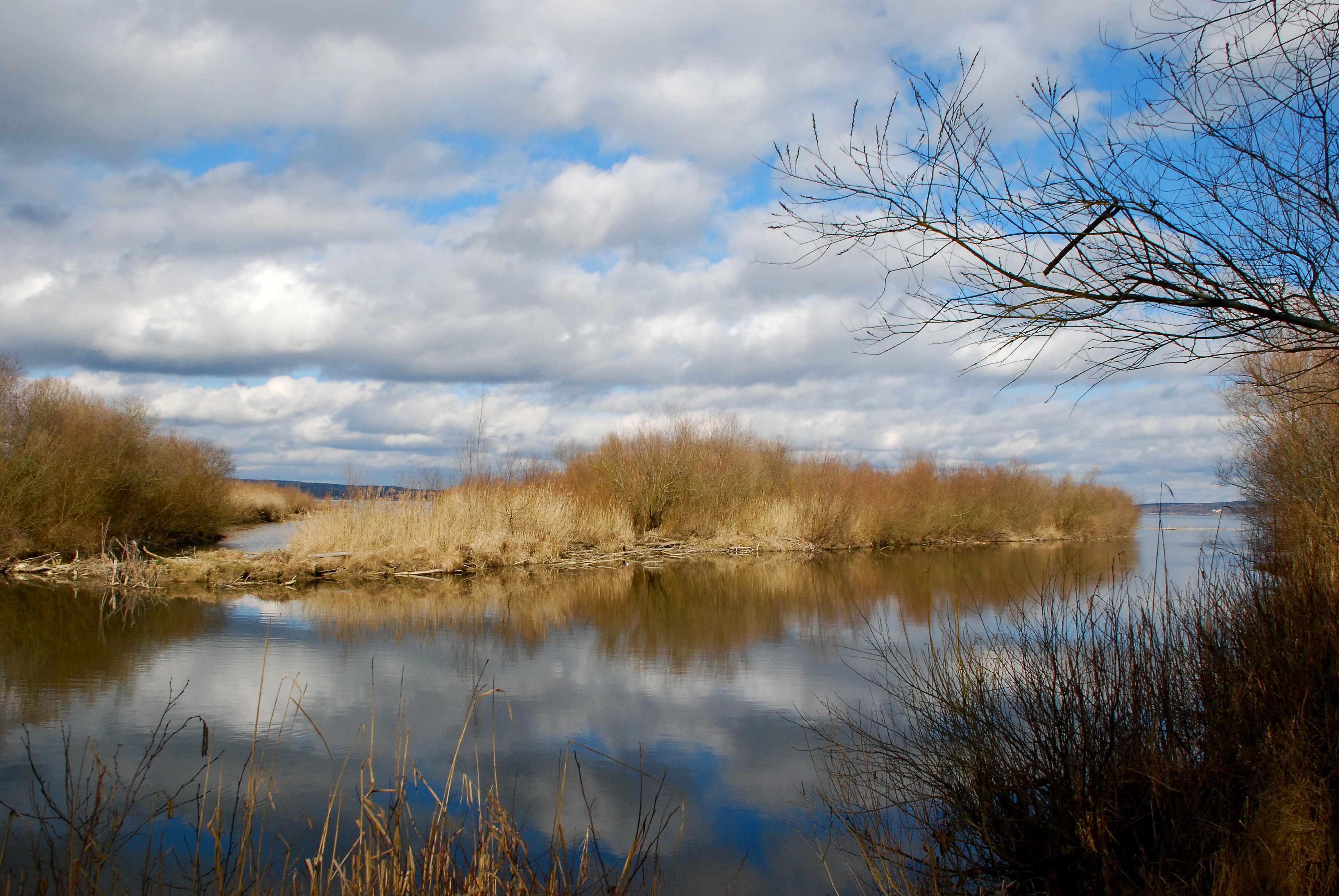 Naturschutzgebiet „Vogelfreistätte Ammersee-Südufer“; Mündung der Ammer in den Ammersee